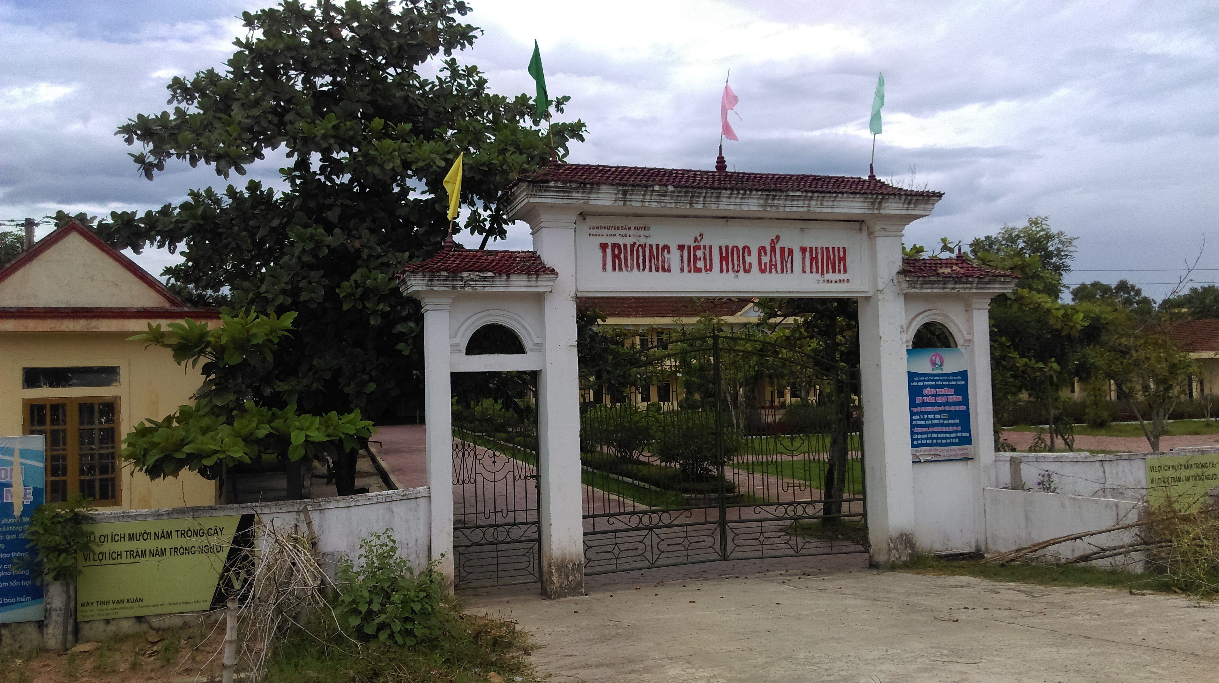 Trường Tiểu học Cẩm Thịnh, Cẩm Xuyên, Hà Tĩnh